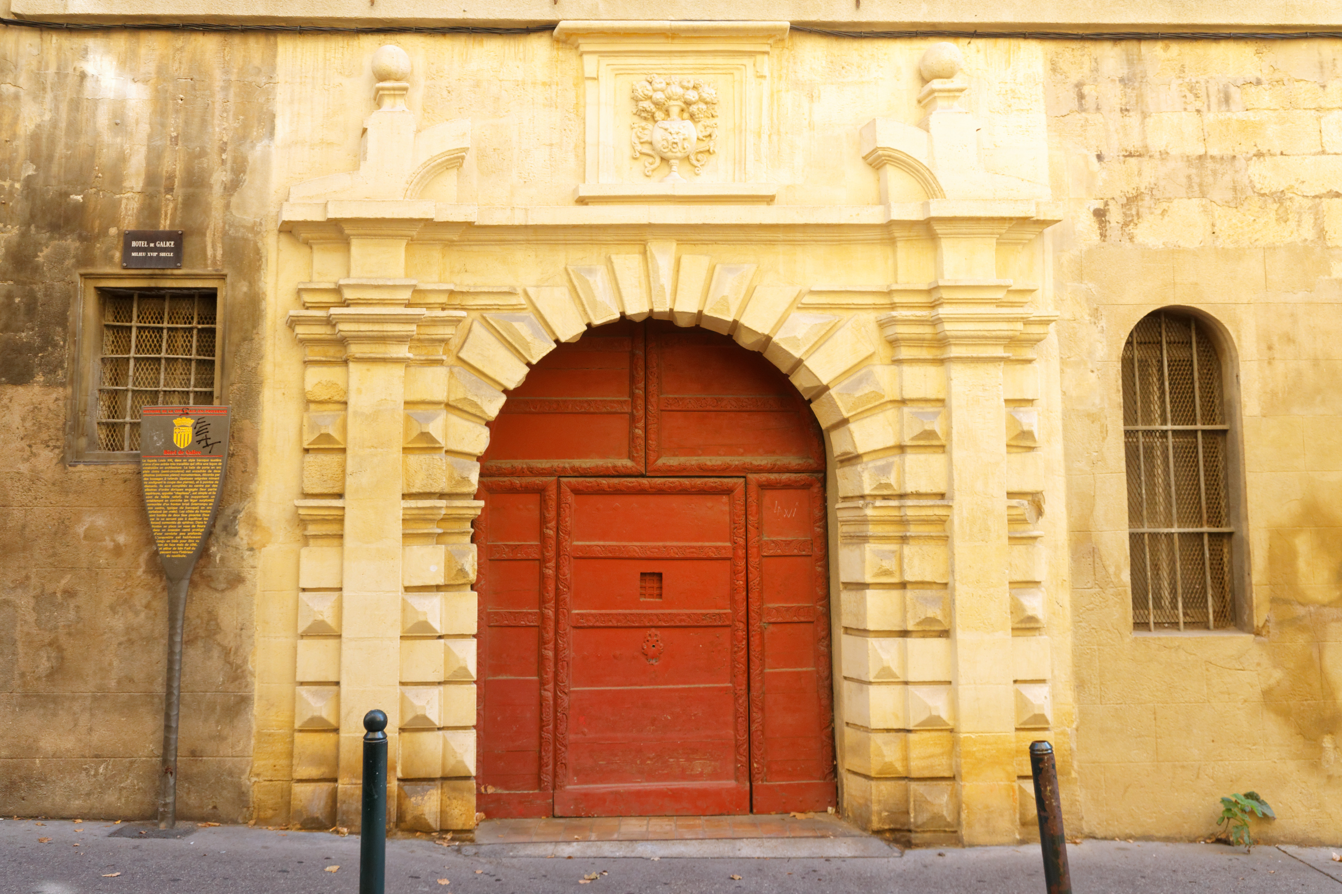 Portal des Hôtel de Galice in Aix-en-Provence